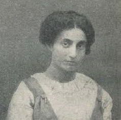 Maria Algranati (1886 - 1978)